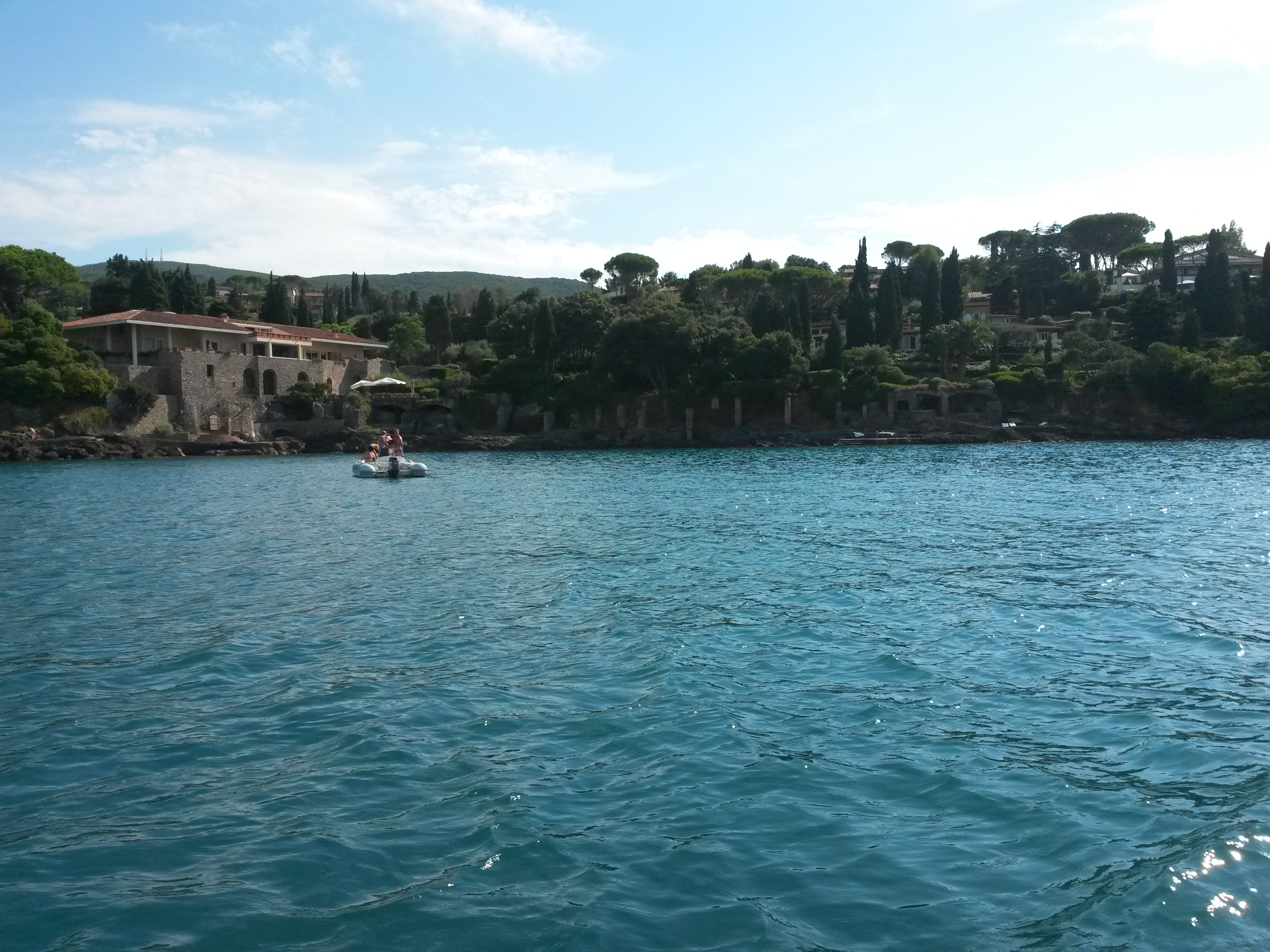 Rovine Romane Bagni di Domiziano.